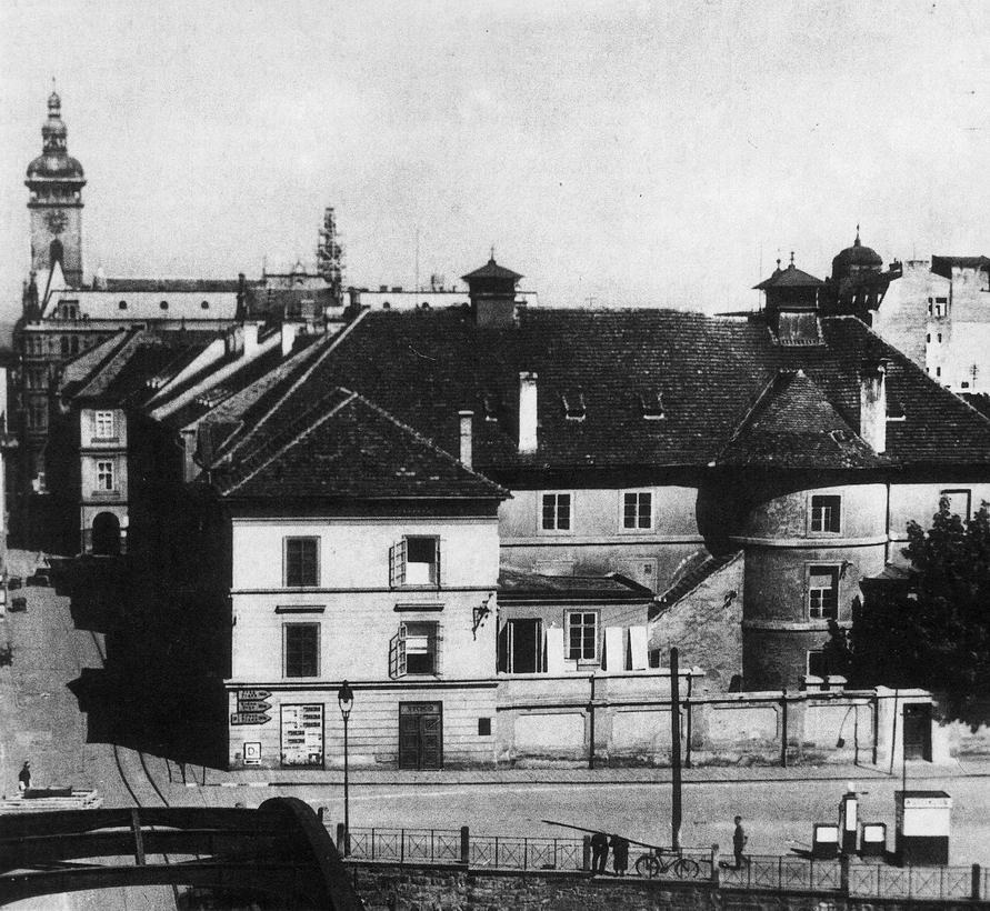 Budova Jihočeského divadla v roce 1919, v průčelí patrná bývalá bašta zakomponovaná do stavby